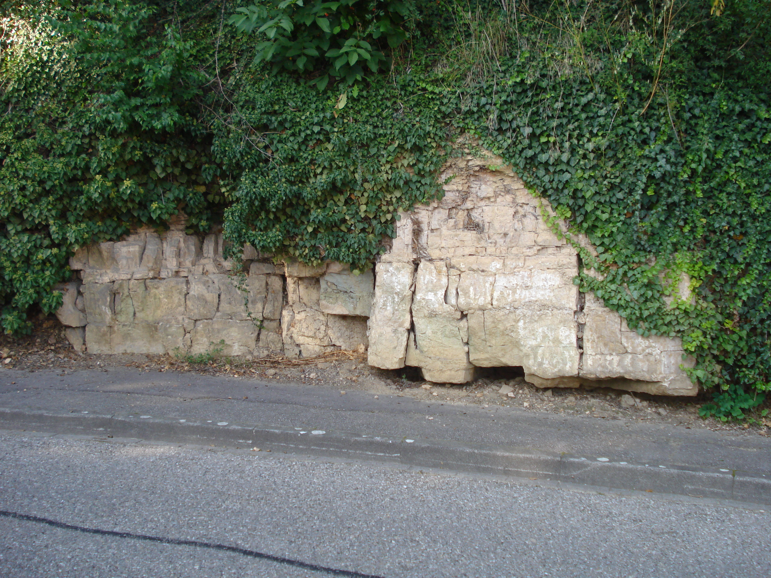 Anstehendes Gestein bei Nimburg-Bottingen